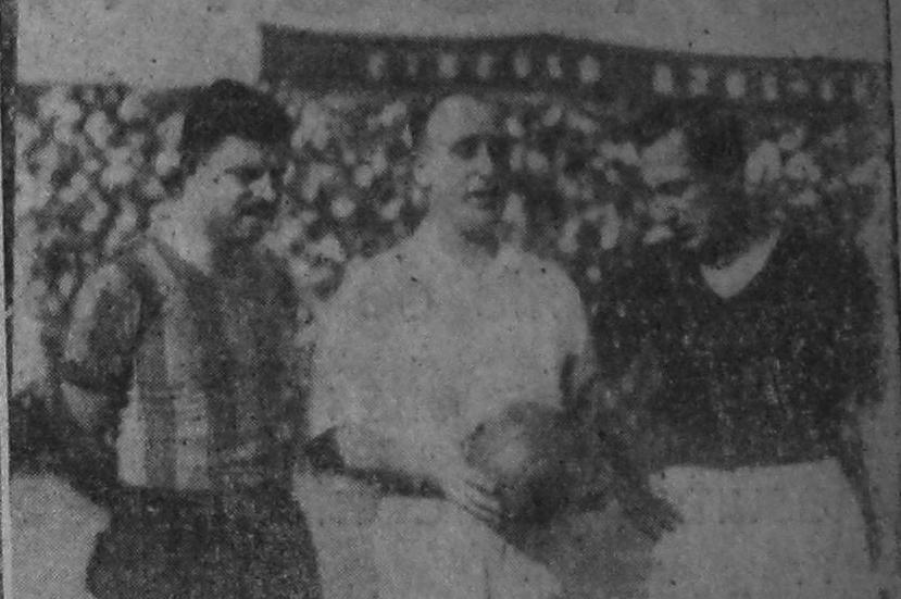 Ignacio Díaz, capitán de Rosario Central, junto al árbitro Korein y su par de San Lorenzo Isidro Lángara, a momentos de iniciarse el encuentro en Arroyito, día 19 de mayo de 1940.